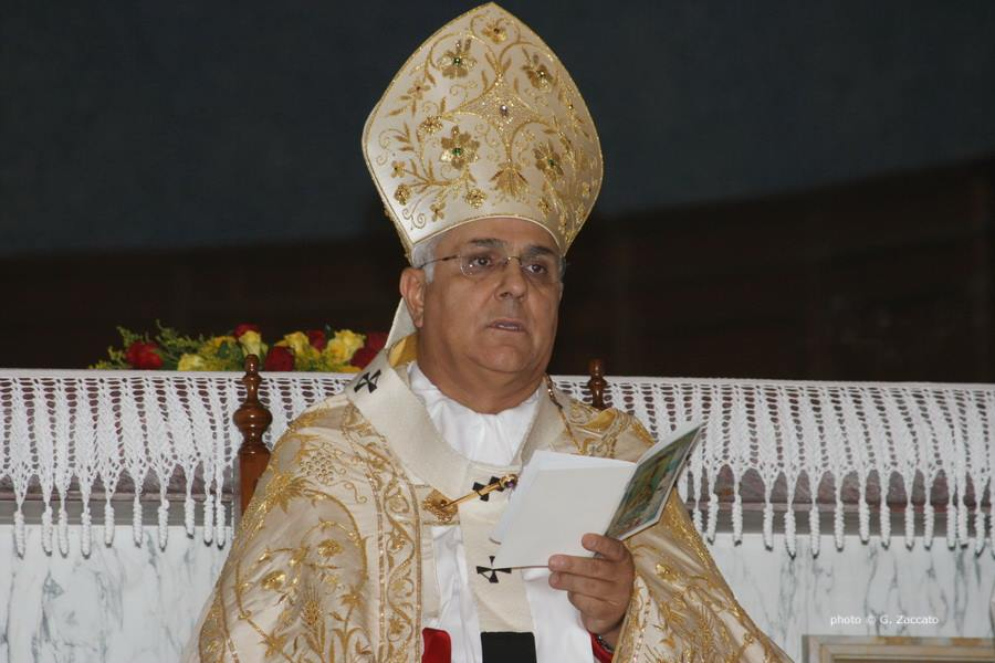 Vincenzo bertolone arcivescovo 2014